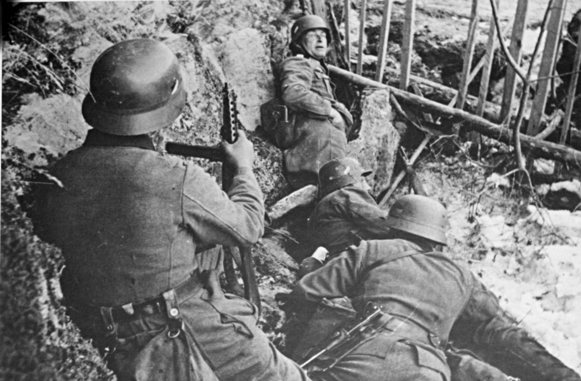 German forces under attack in Norway, possibly somewhere on the road from Hønefoss to Bagn. From left oberleutnant Herman Kornoff (died at Bagnsbergatn), hauptmann Herbert Stemmer (wounded at Bagnsbergatn). See also Kampen i Gråbeinhølet, Kampen om Bagnsbergatn gård and Kampene langs Randsfjorden, i Ådalen og Valdres.